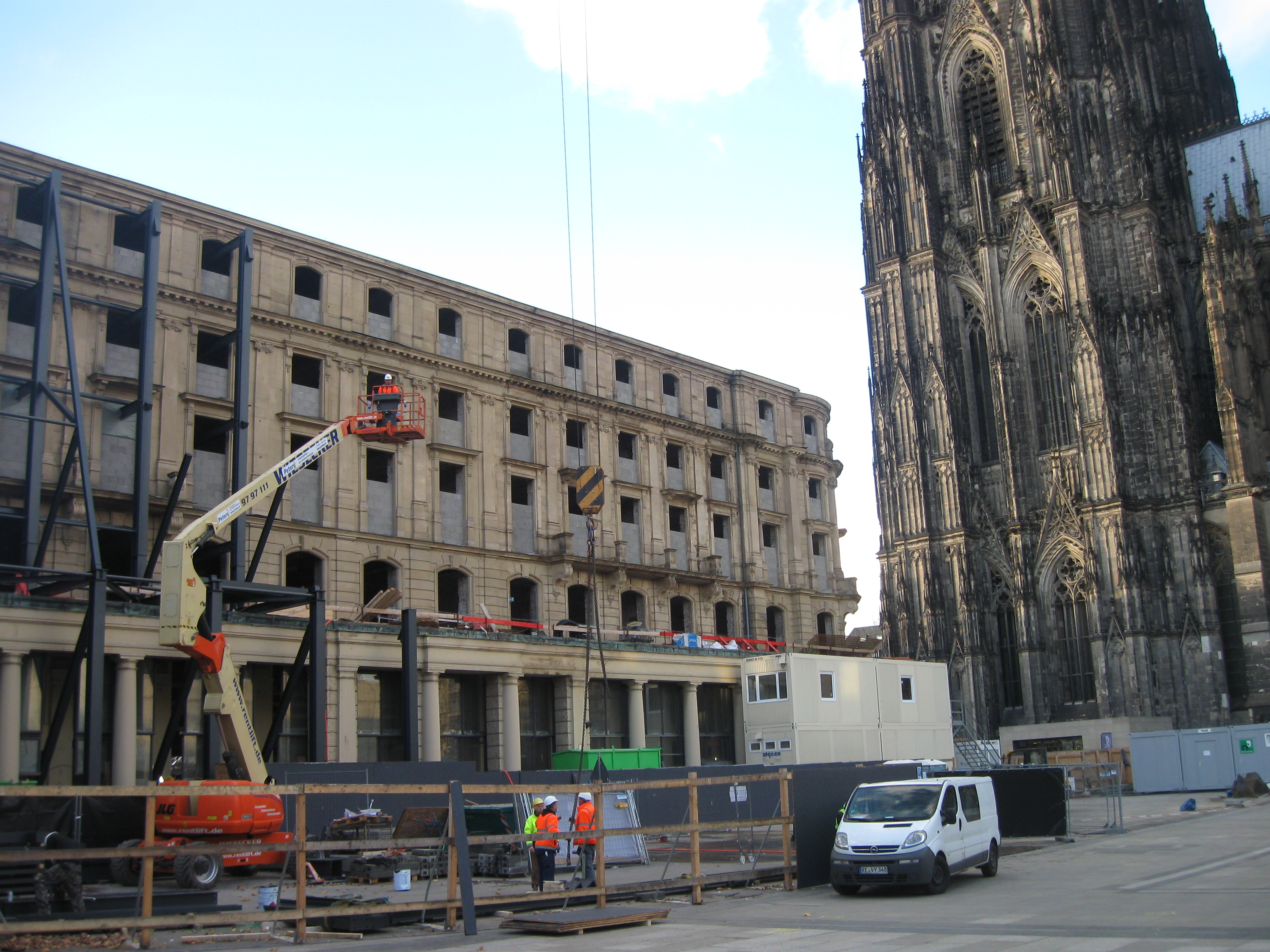 Reformas en Colonia